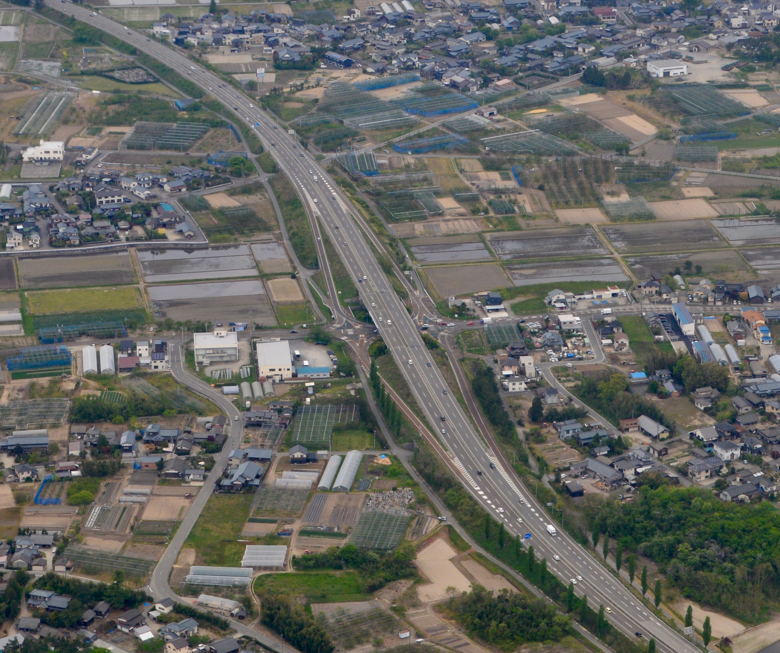 新新バイパス聖籠インターチェンジ